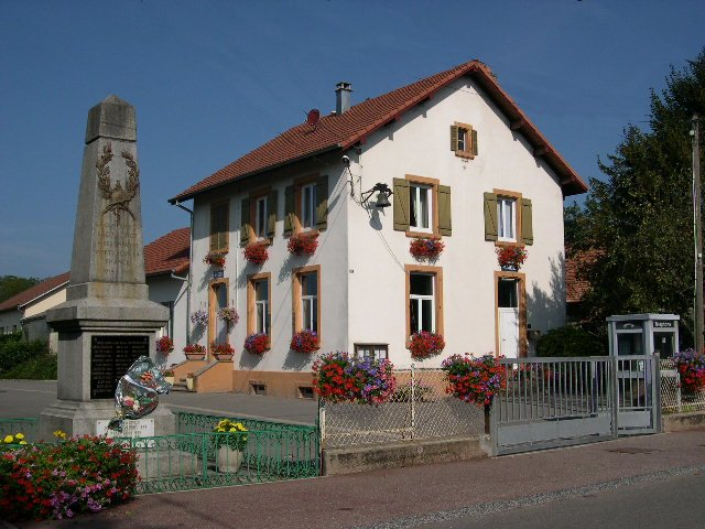 Maire du village de Lacollonge (Territoire de Belfort) Photo prise par LP90